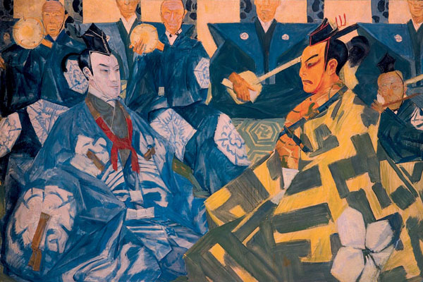 Japanese Theatre (Kabuki)